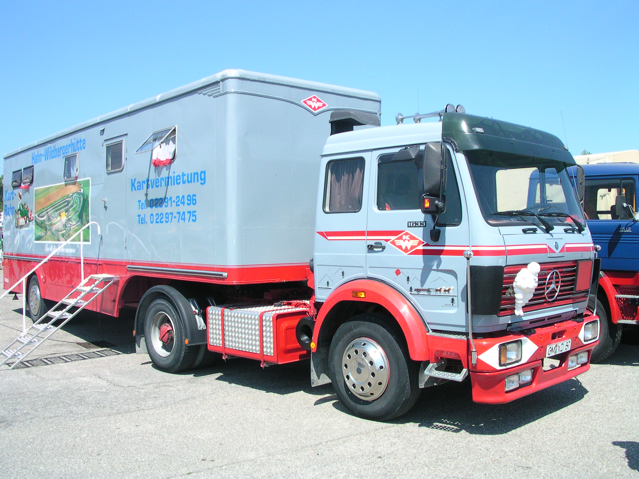 großes Oldtimertreffen im Mercedes-Werk in Wörth am Rhein 2006